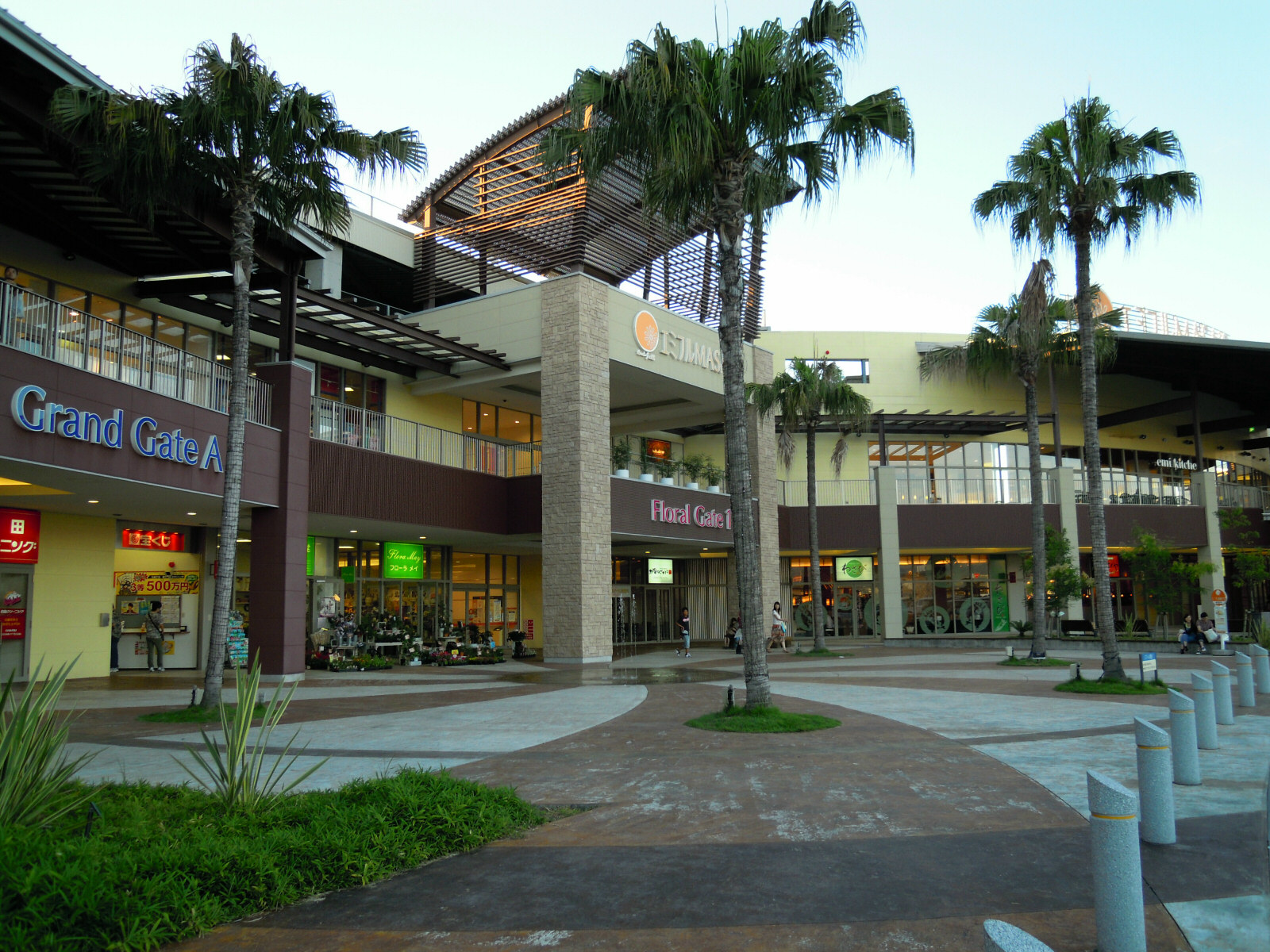 EMIFULL MASAKI